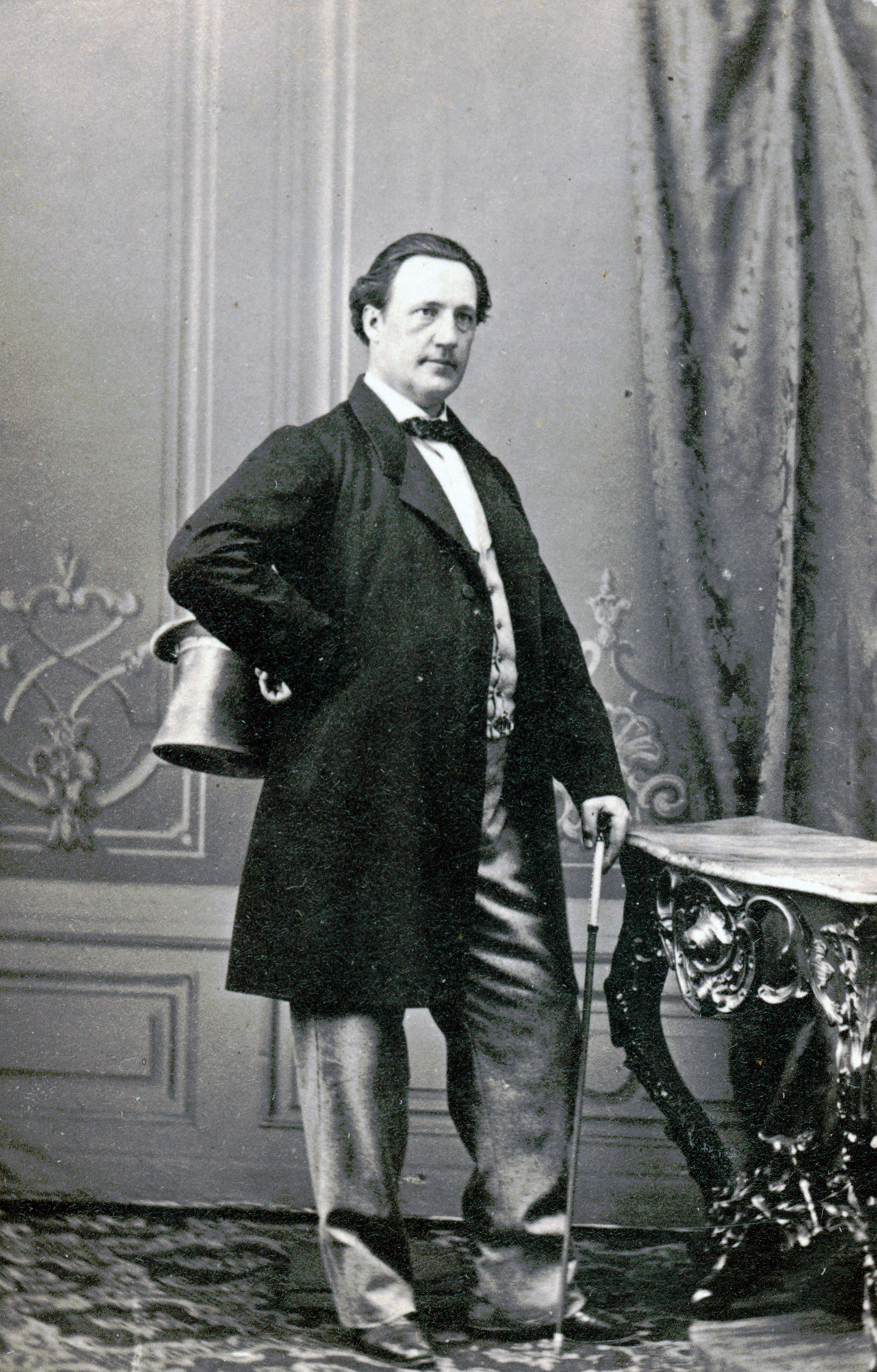 Mauritz Pousette, teaterdirektör 1863